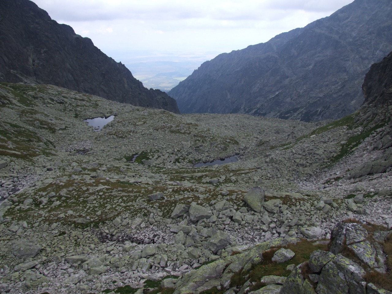 Strzelecka Kotlina i Niżnie Strzeleckie Stawy w Dolinie Staroleśnej {słowackie Tatry Wysokie)